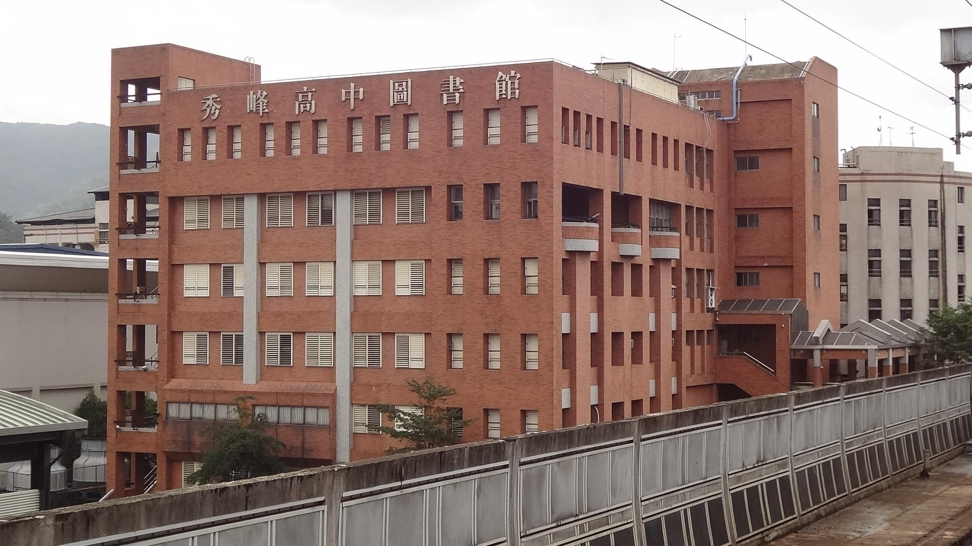 中文（台灣）: 從臺灣鐵路管理局南下列車拍攝新北市立秀峰高級中學圖書館。